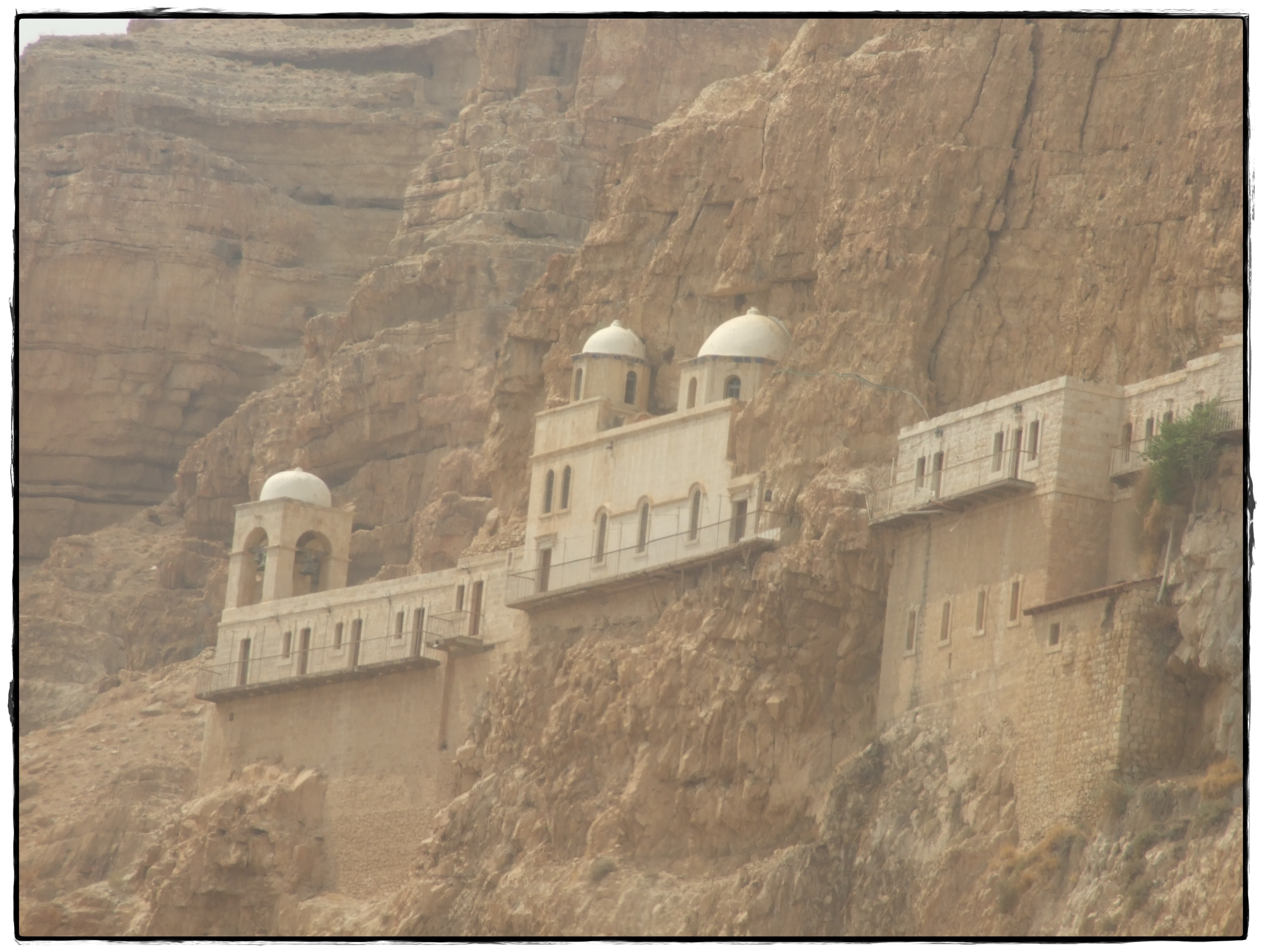 העיר העתיקה בירושלים (בערבית: بلدة القدس القديمة, נהגה: בִּלִדַת אֶלקוּדְס אֶלקָדִימָה) היא האזור העירוני העתיק של ירושלים. שטחה המוקף על ידי חומות ירושלים הוא כ-850 דונם.כמו כן נכללים בעיר העתיקה הר ציון ועיר דוד, הנמצאים מחוץ לחומות, בסמוך ומצד דרום. העיר העתיקה מהווה מוקד משיכה מרכזי לתיירים בני דתות ואומות שונות, אשר באים מרחבי העולם לבקר את האתרים הקדושים הנמצאים בה, ובהם: הר הבית, הכותל המערבי וכנסיית הקבר.